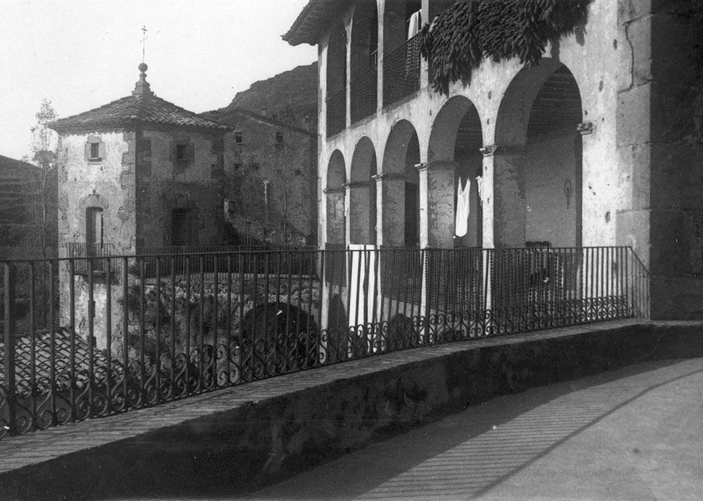 Vista parcial del Cavaller de Vidrà des del balcó. Lluís Vila i d'Abadal (Entre 1910 i 1936)